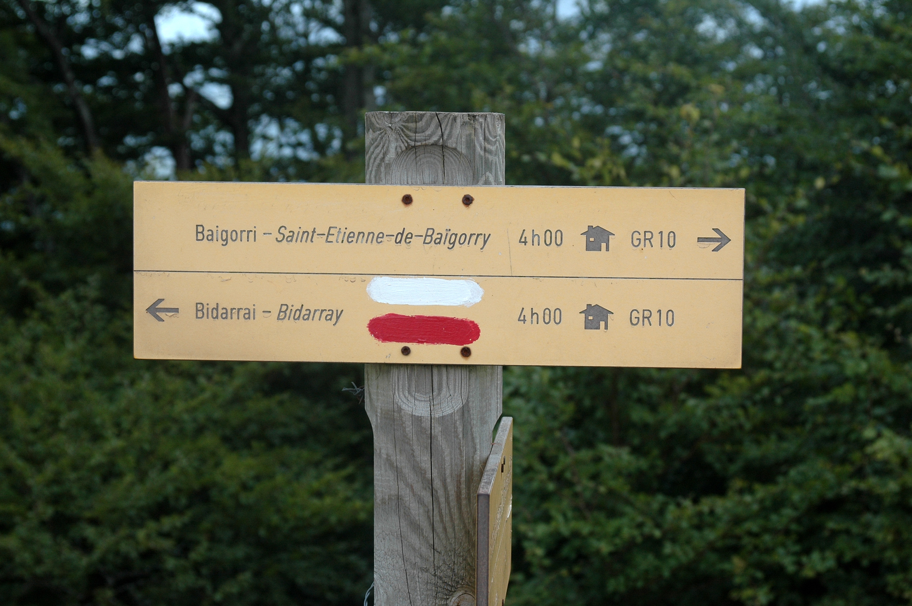 Saint-Étienne-de-Baïgorry, marque du GR 10 au col d'Harriéta (808 m). Photo prise le 03/08/06 par Harrieta171